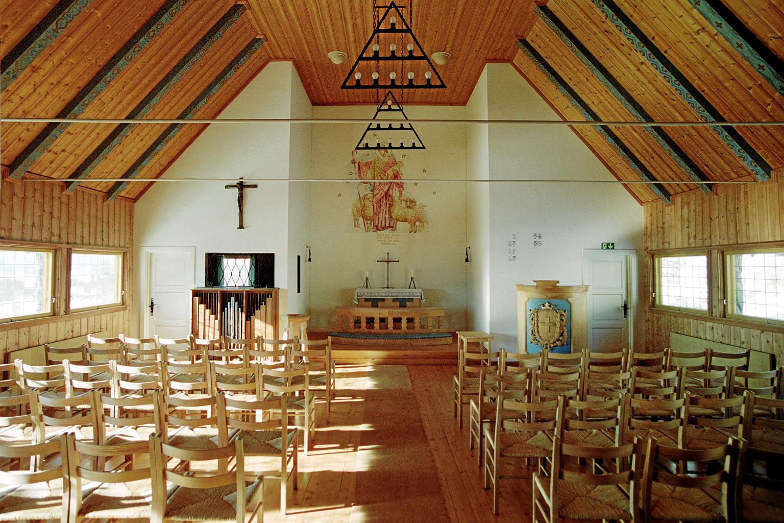 Interiøret til Lykkja kapell, en langkirke fra 1961 i Hemsedal kommune, Buskerud fylke, Norge. Altertavla er malt av Trygve M. Davidsen.